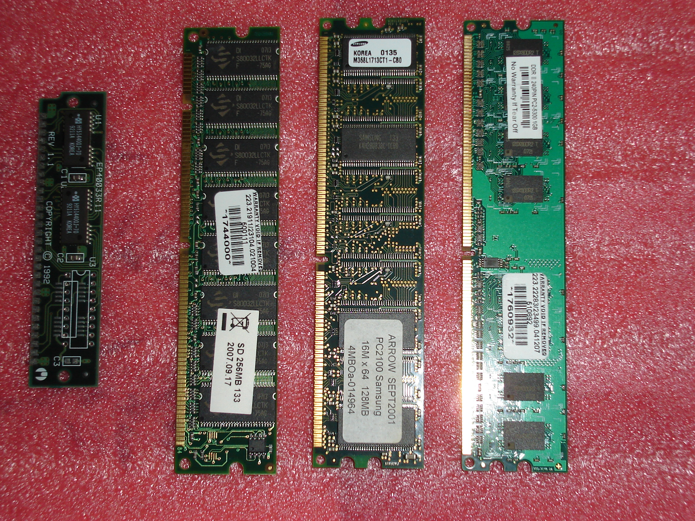 Arten von RAM-Speicher - EDO-RAM, SD-RAM, DDRI-RAM, DDRII-RAM